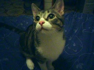 Gato común europeo con pelaje "romano".